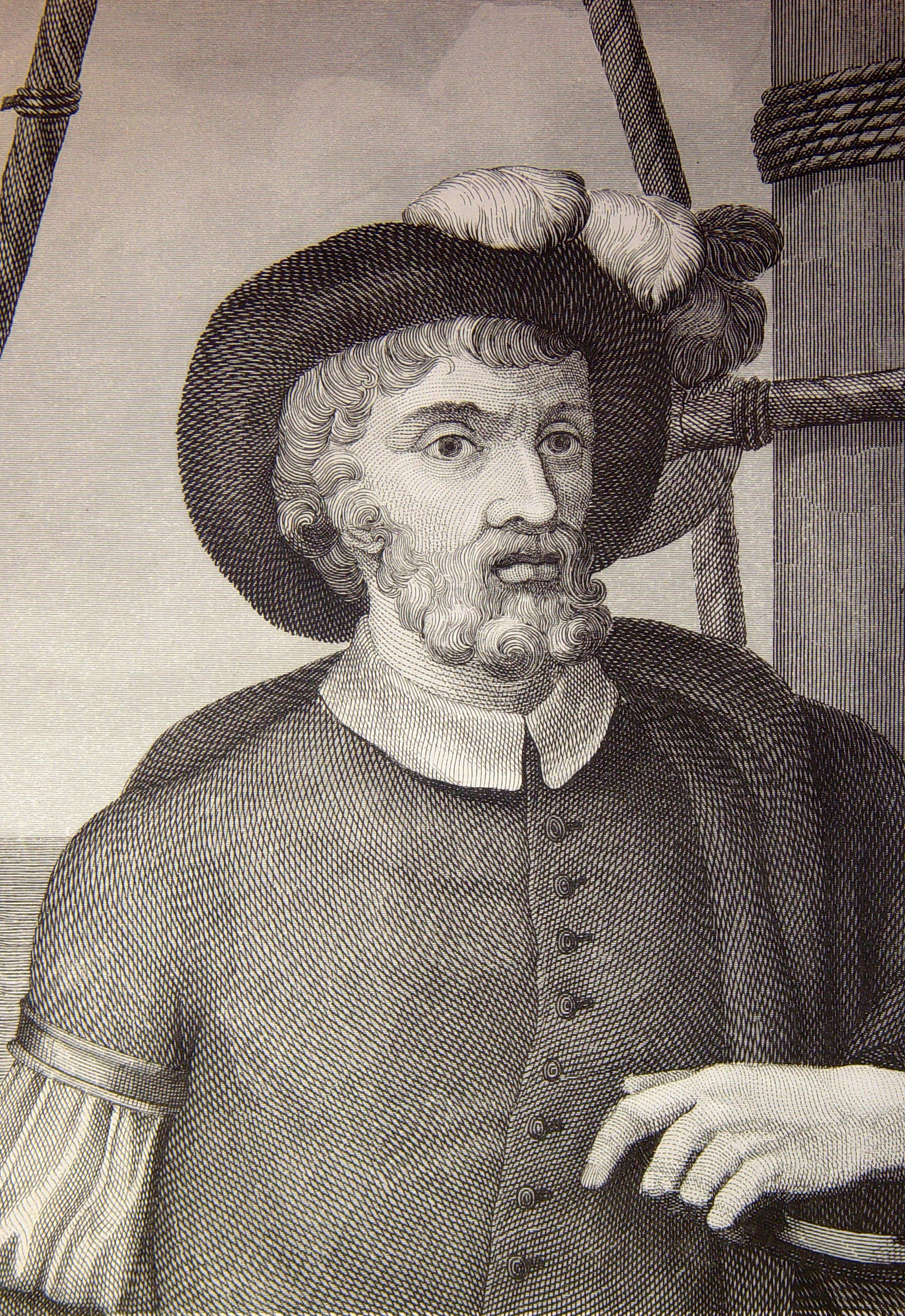 Ilustraciones pertenecientes al libro: Las glorias nacionales : grande historia universal de todos los reinos, provincias, islas y colonias de la Monarquía Española, desde los tiempos primitivos hasta el año de 1852. - Madrid [etc.] (Barcelona : Imprenta de Luis Tasso) Librería de la Publicidad [etc.], 1852-1854.